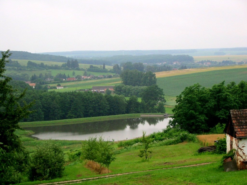 Gutorfölde, horgásztó